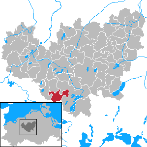 Reimershagen in Mecklenburg-Vorpommern - District Güstrow